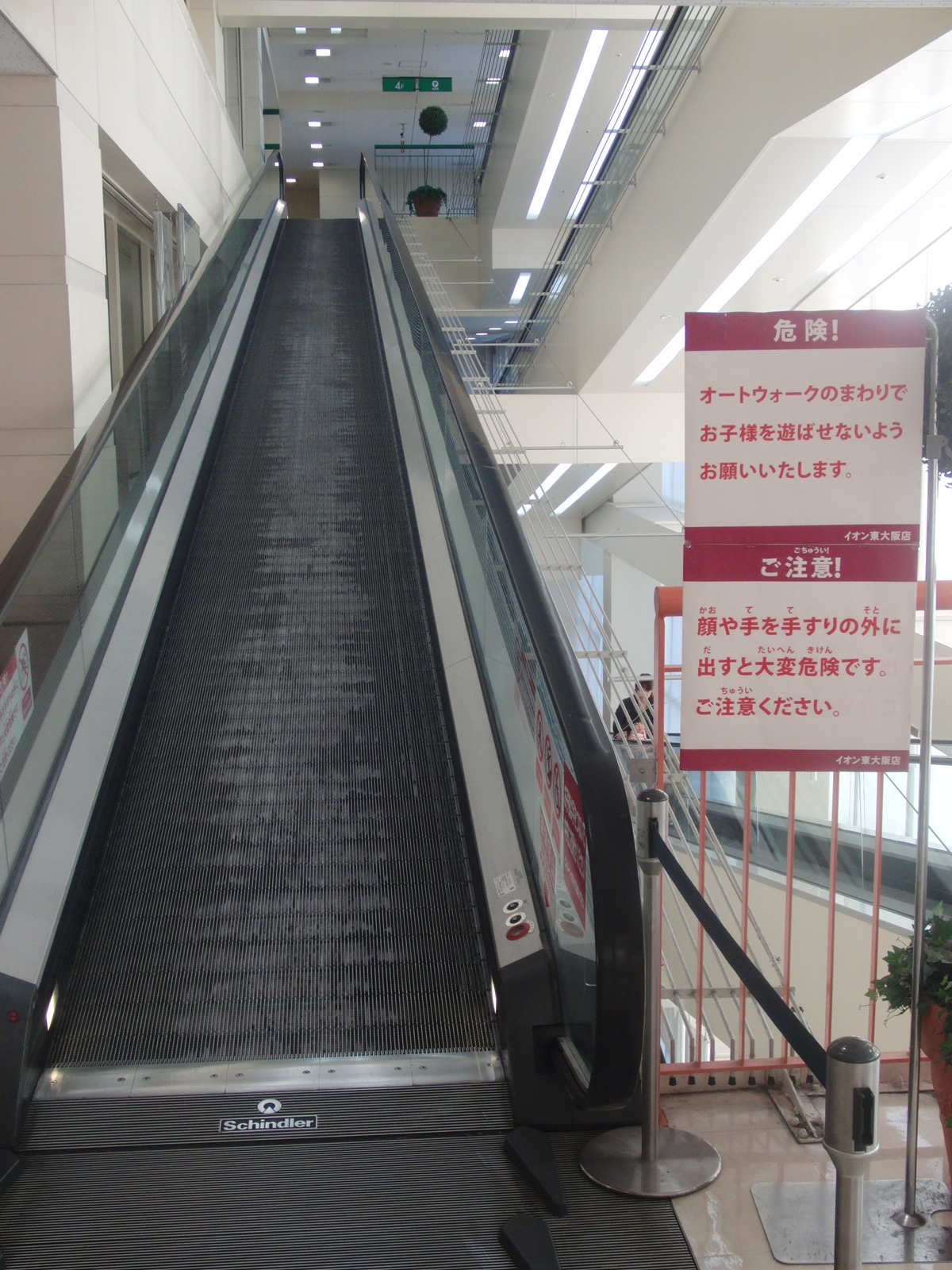 イオン東大阪店で撮影したオートウォーク式エスカレーター